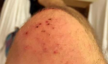 Verletzung durch Arbacia lixula.